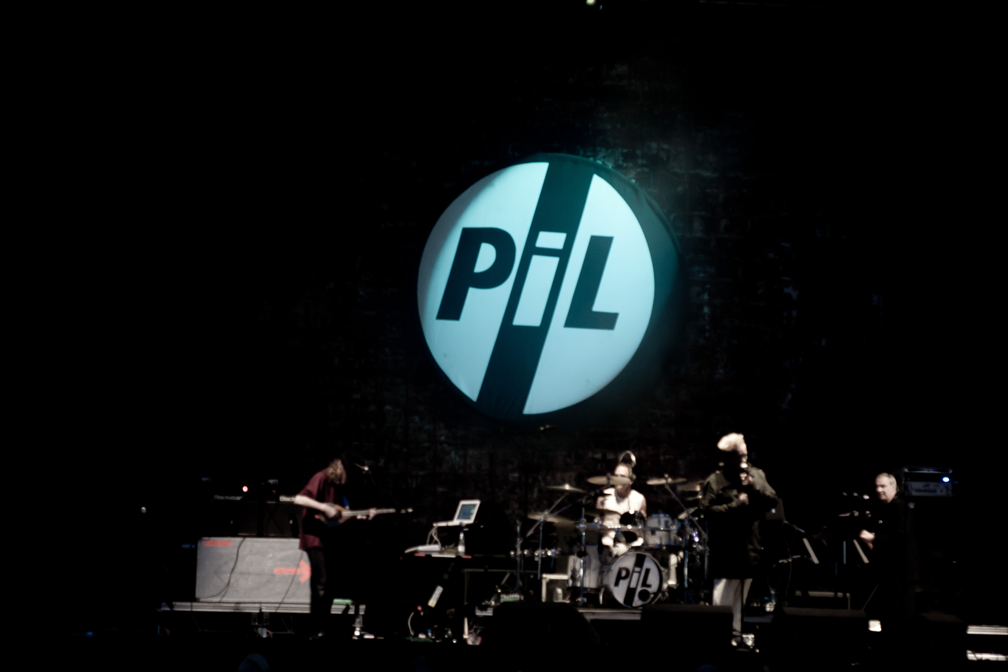 P.I.L.